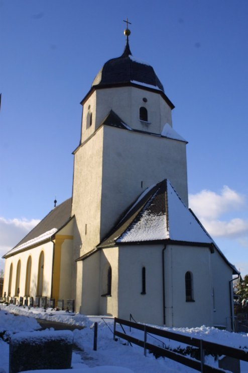 Pfarrkirche von Königsfeld in Oberfranken im Landkreis Bamberg